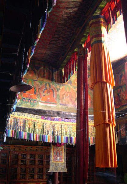 Gompa de Likir, a Ladakh (Jammu i Caixmir, Índia)